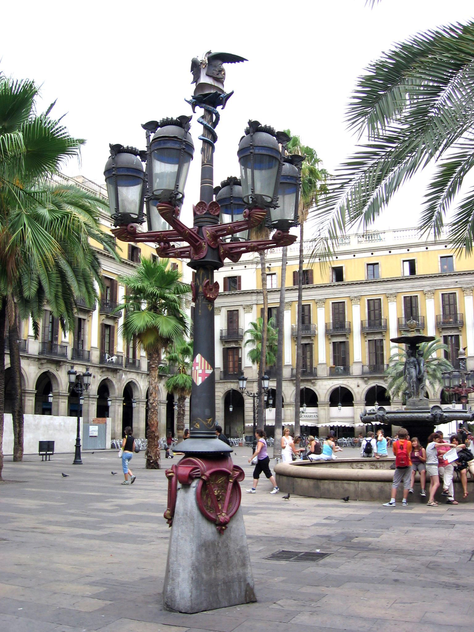 Farola de la Plaza Real de Barcelona, de Antoni Gaudí